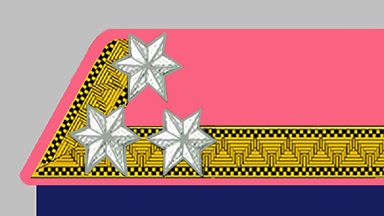 K.u.k. Feldwebel der Infanterie mit rosenroter Egalisierung.